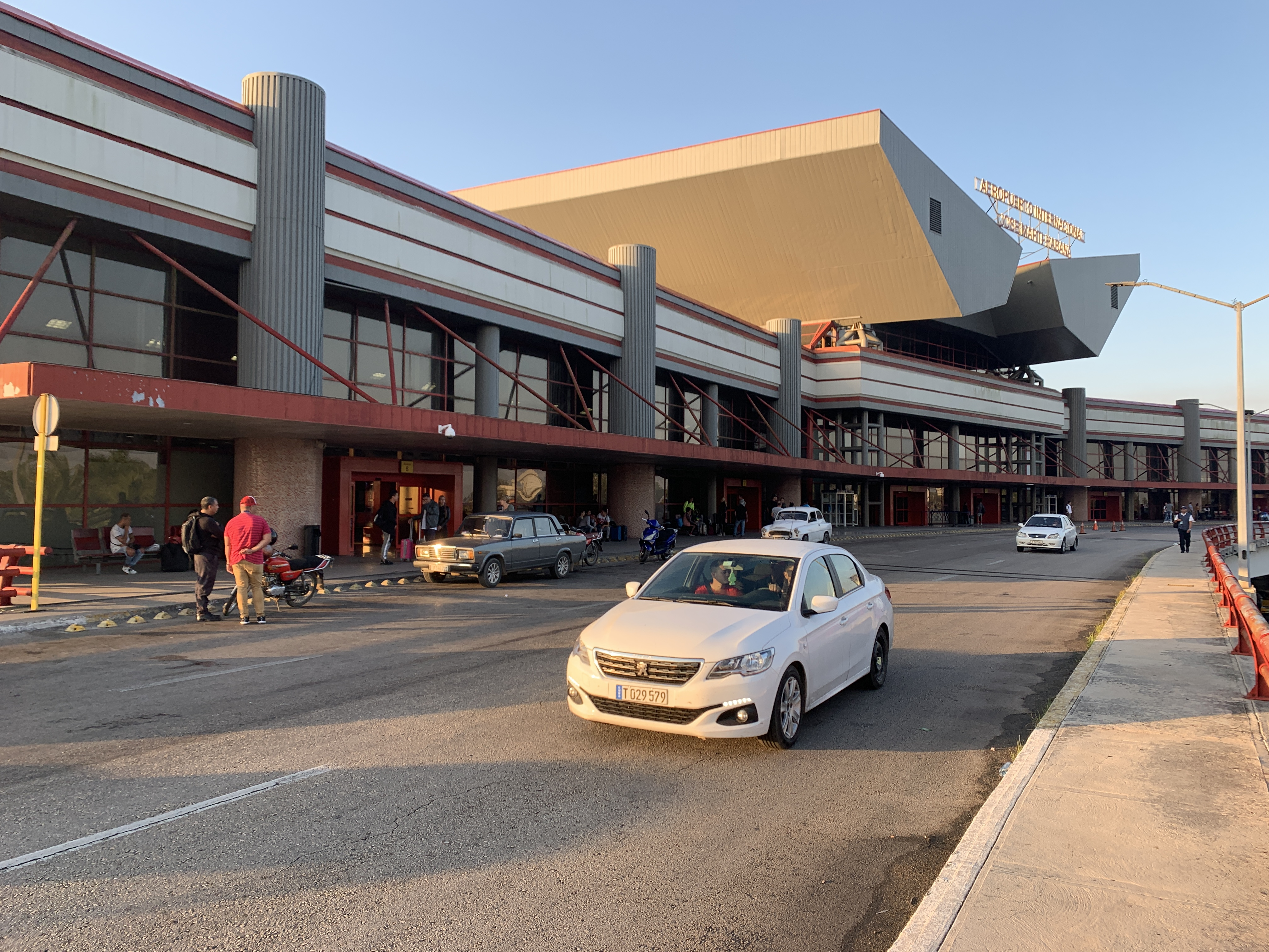 Area de salidas en la terminal 3 del aeropuerto Jose Marti de La Habana, Cuba.